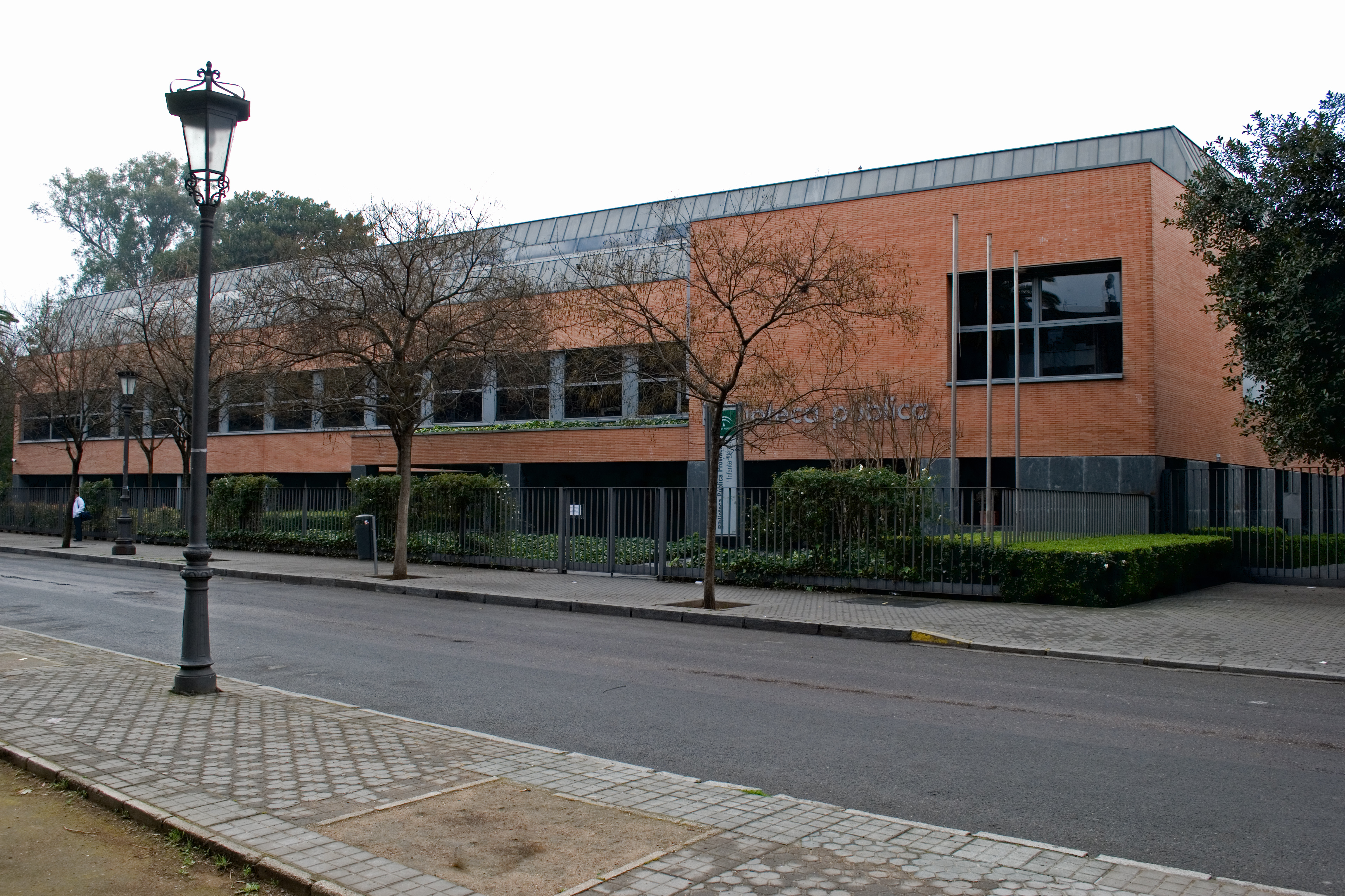 Biblioteca Infanta Elena, Sevilla. Arquitectos Cruz y Ortiz (1995-1999)